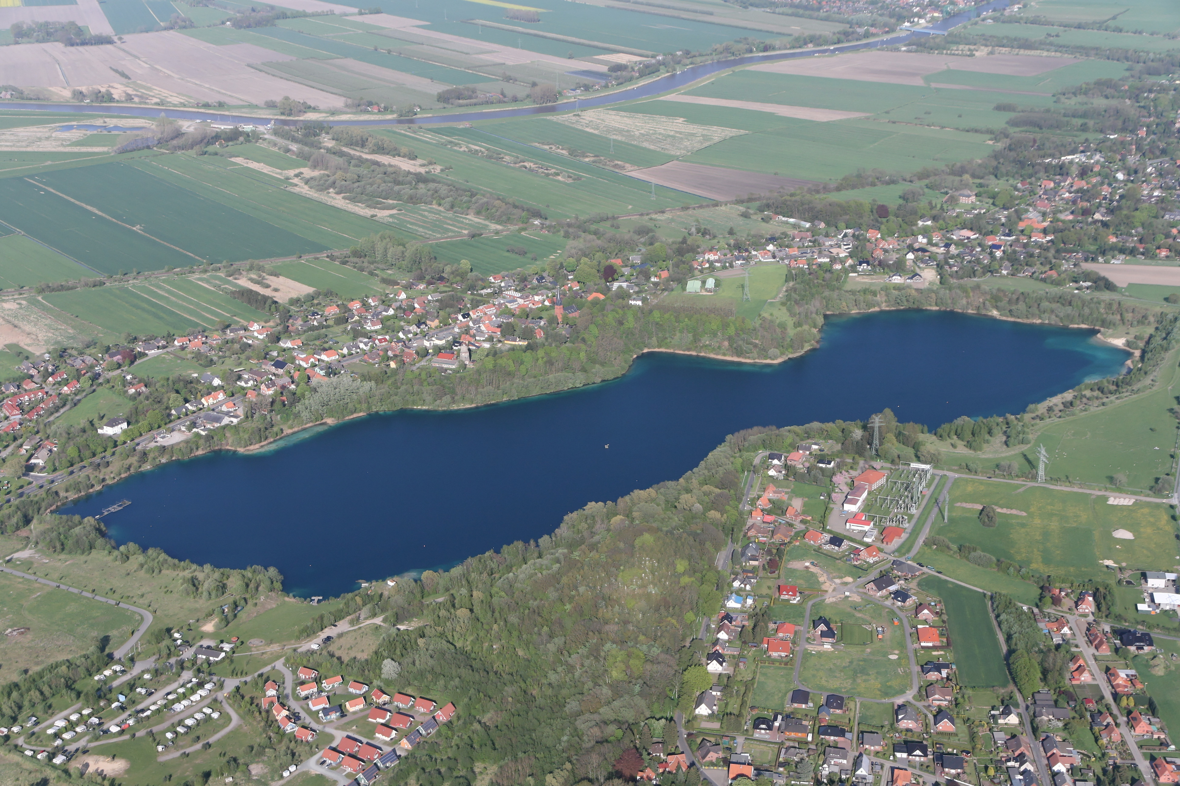 Luftaufnahme: der Kreidesee in Hemmoor